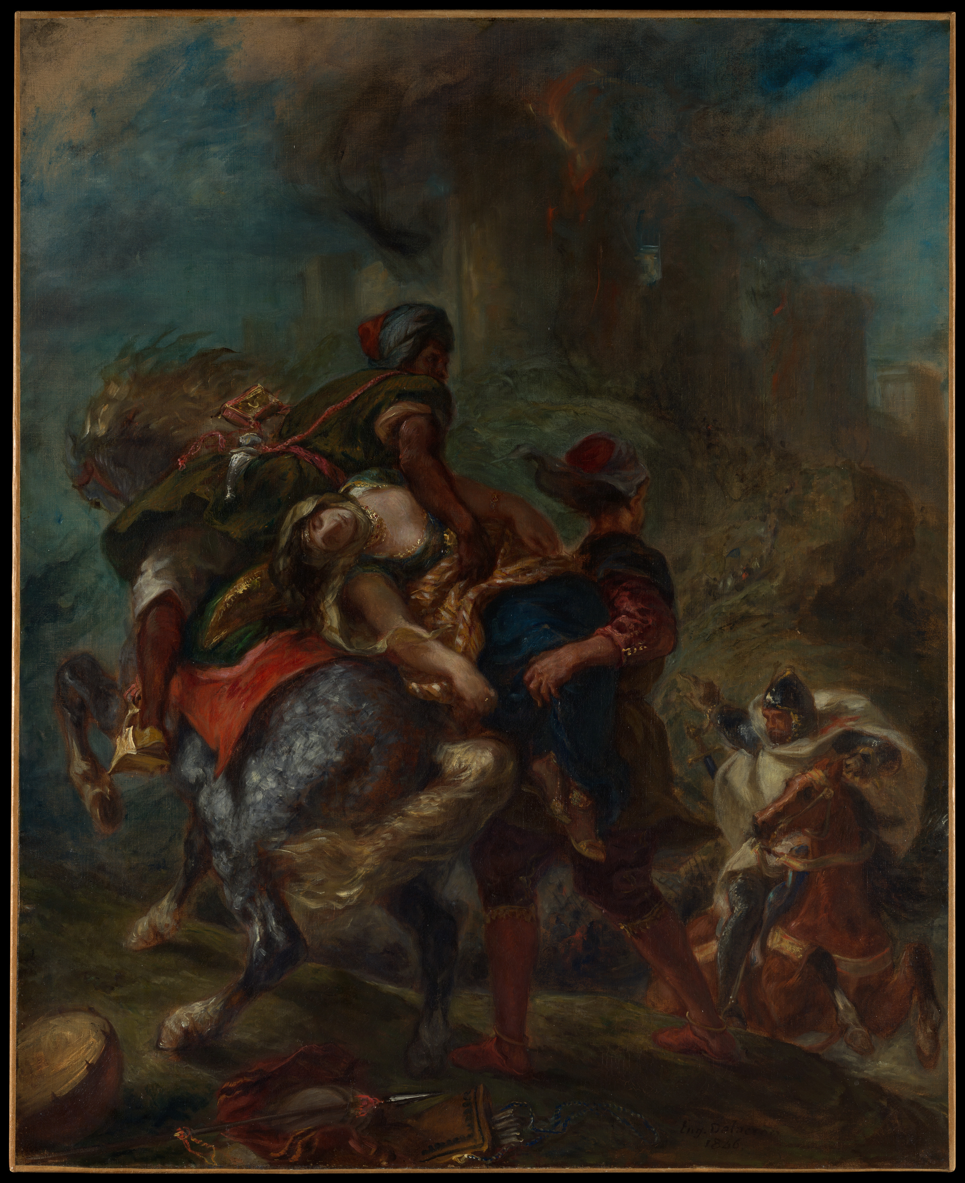 Painting; Paintings